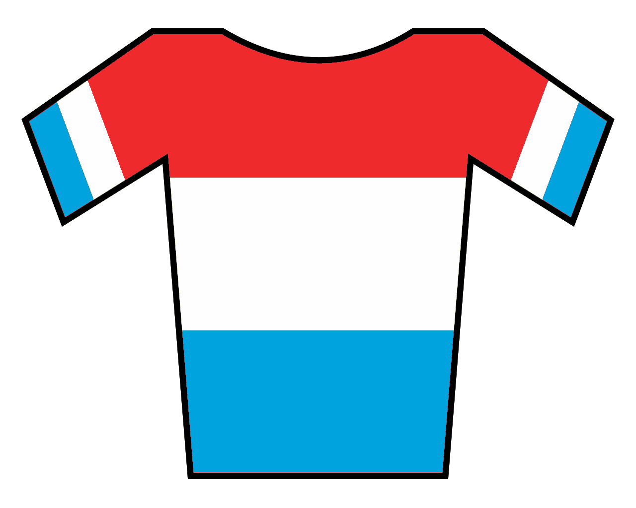 Maillot de Luxemburgo